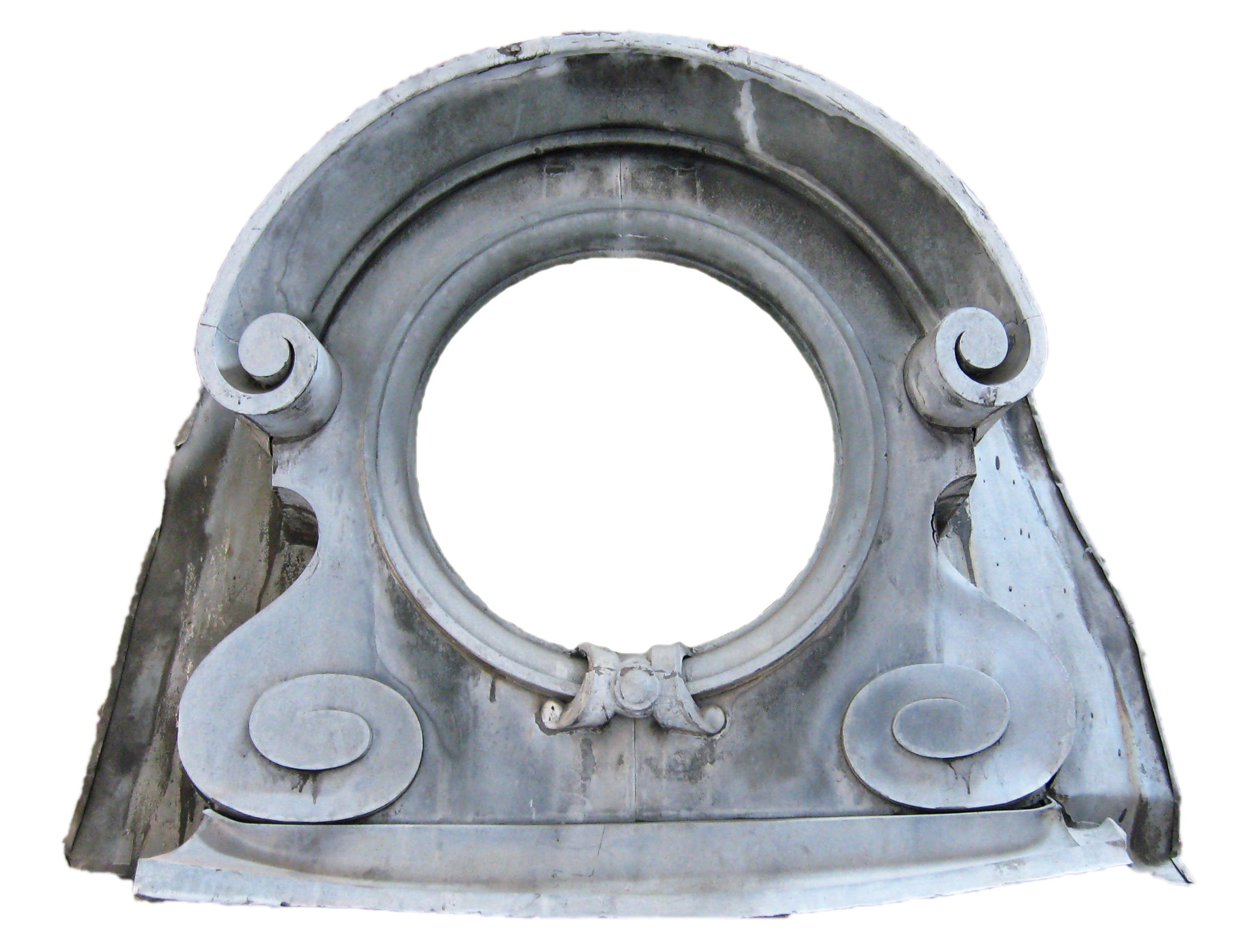 Gebäudeverzierung